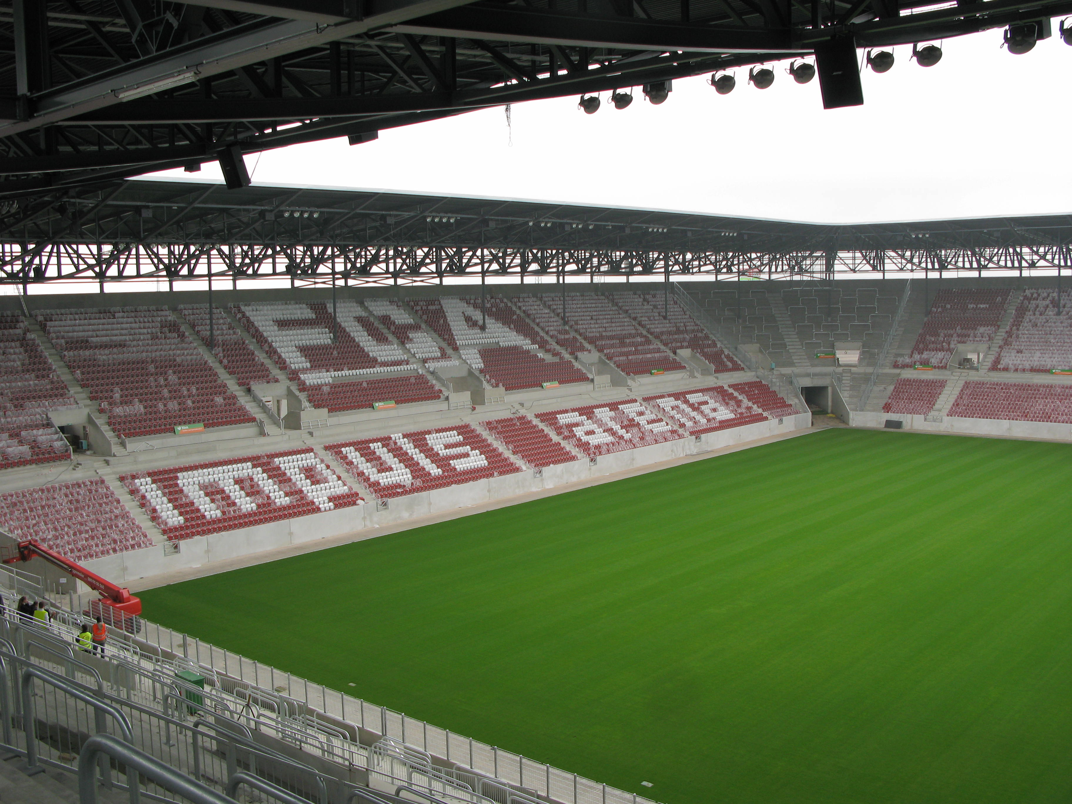 Impuls Arena in Augsburg (Bayern, Deutschland) im Bau. Innenansicht der Ost-Tribüne am 28.06.2009.